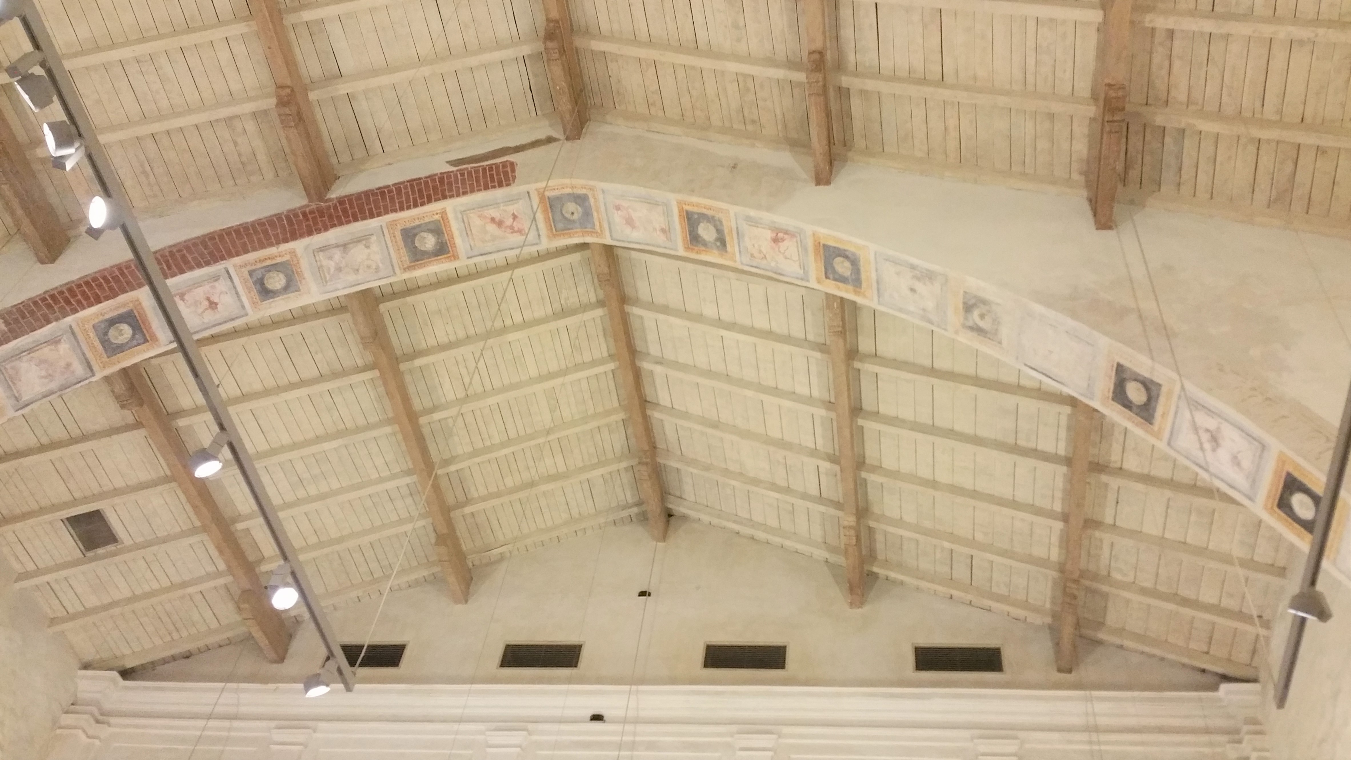 soffritto all'interno della chiesa di Santa Maria Maddalena